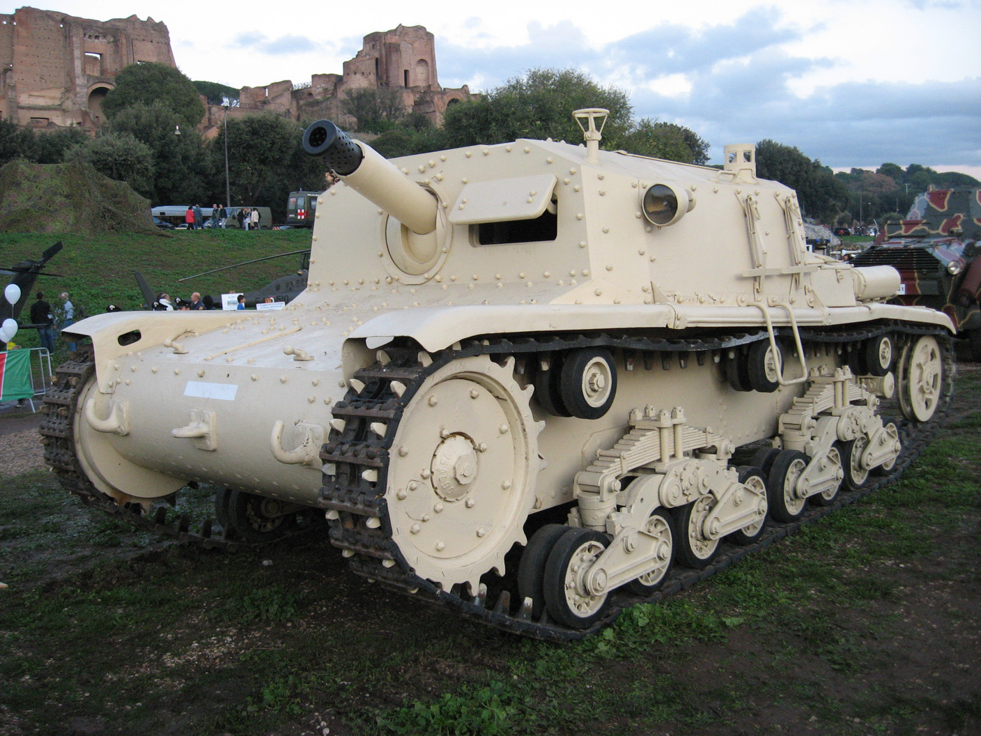 Semovente Ansaldo 75/18, fotografato in occasione della Festa delle Forze Armate. L'esemplare era in esposizione pubblica al circo Massimo (Roma).